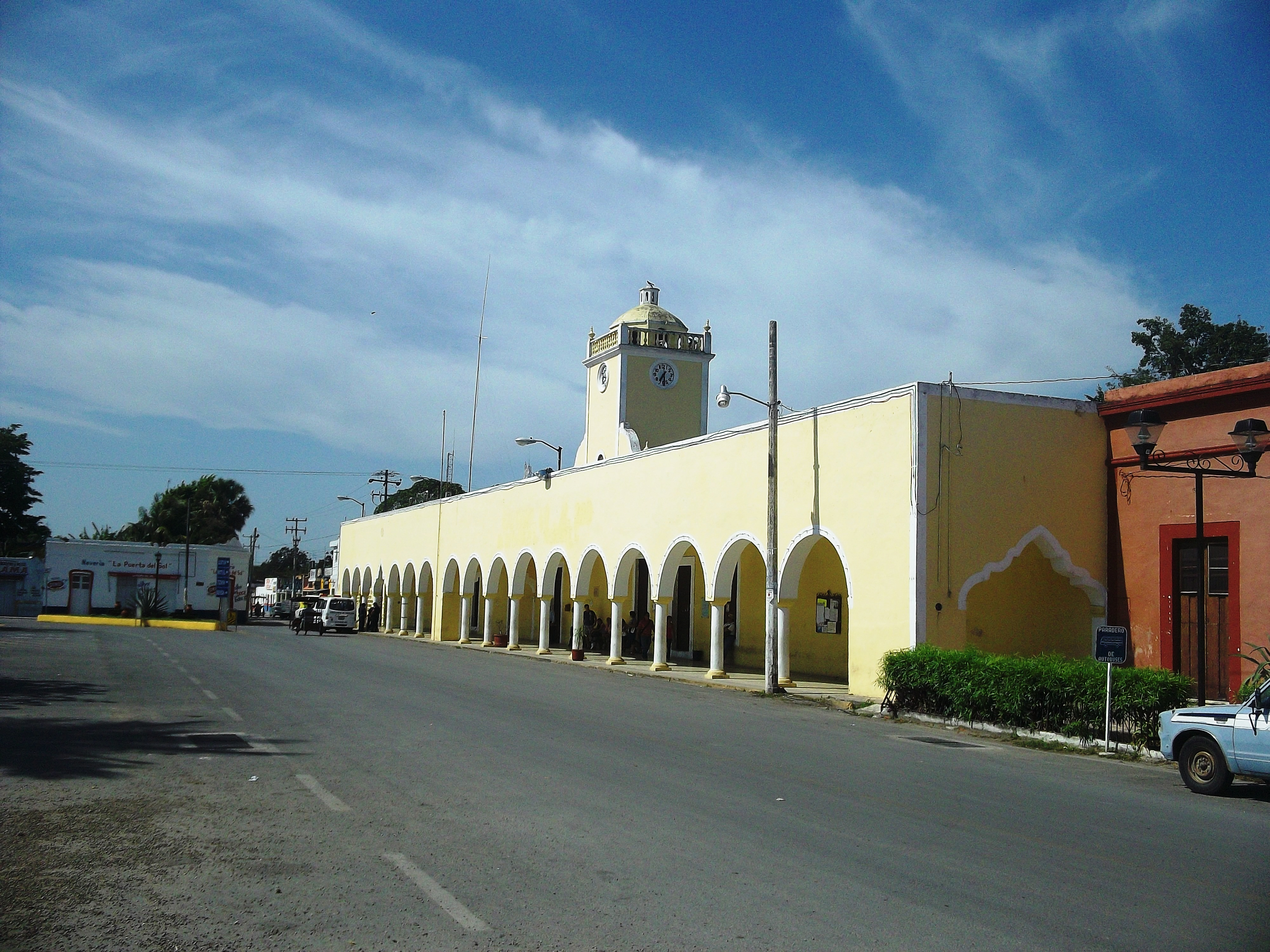 Palacio municipal de Conkal, Yucatán.